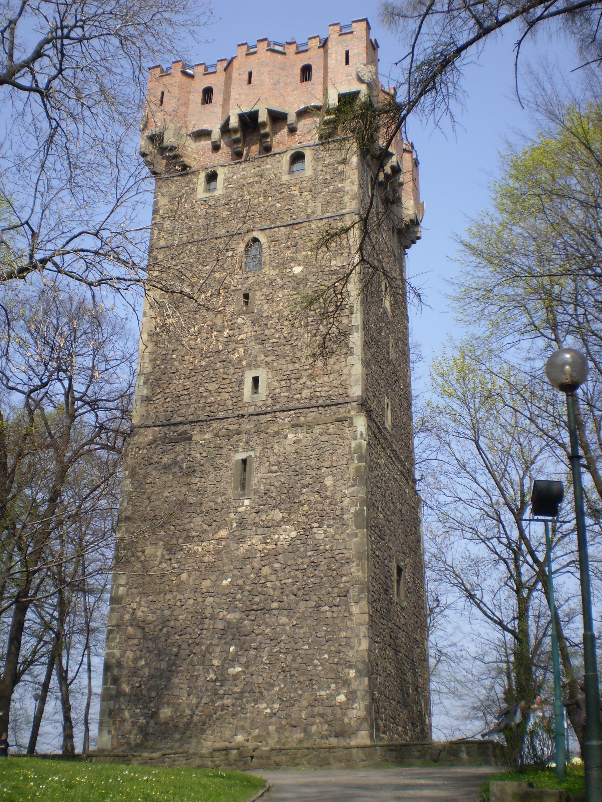 Piastovská věž v polském Těšíně.